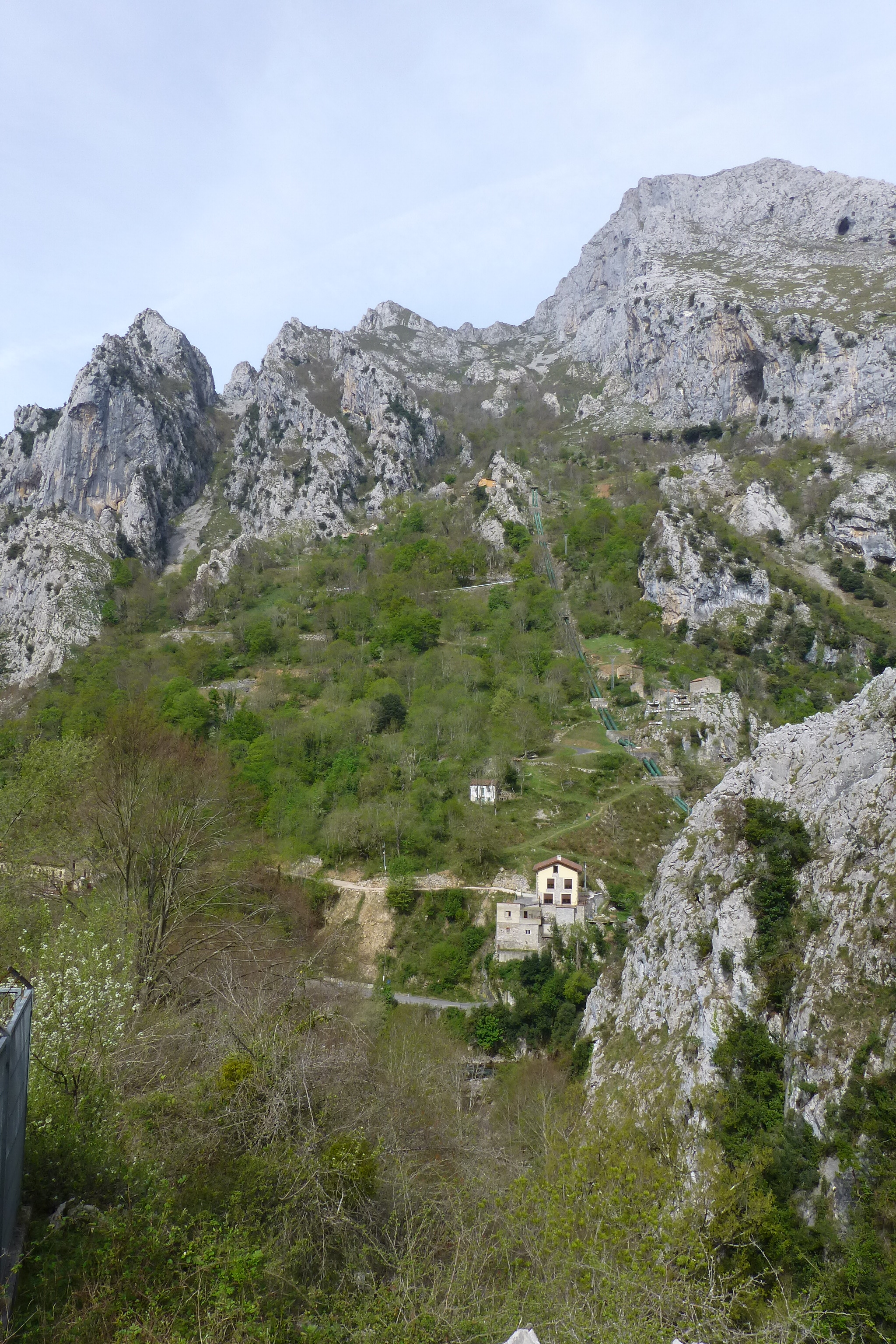 Vista general de la población de Camarmeña en Cabrales Asturias, España.